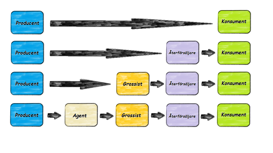 Distributionskanal